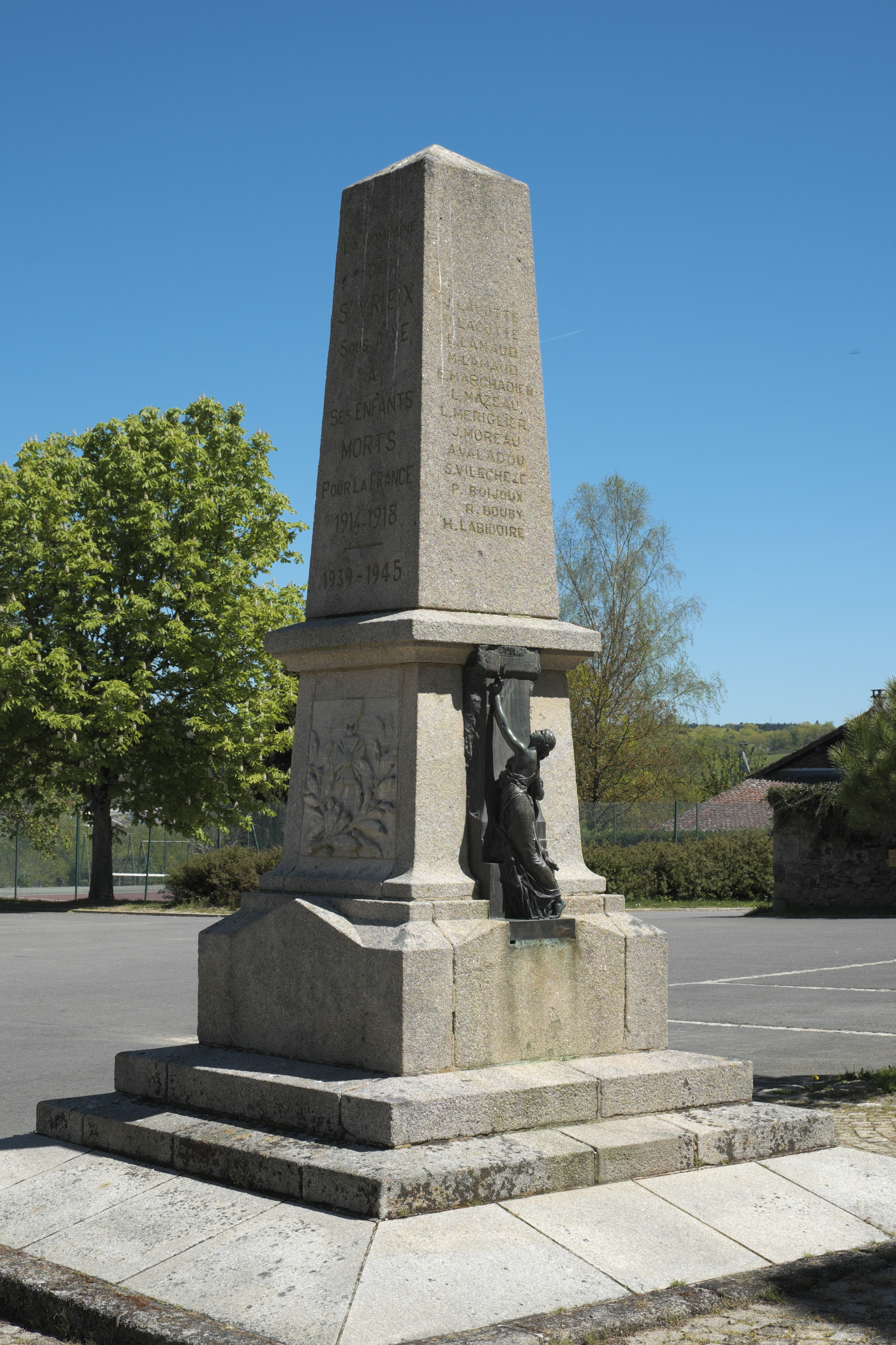 Kriegerdenkmal in Saint-Yrieix-sous-Aixe im Département Haute-Vienne (Nouvelle-Aquitaine/Frankreich)